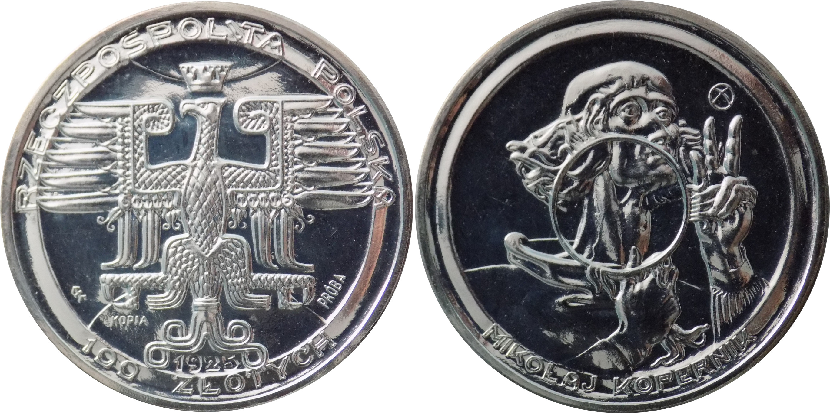 Replika 100 złotych 1925 duży Kopernik srebro